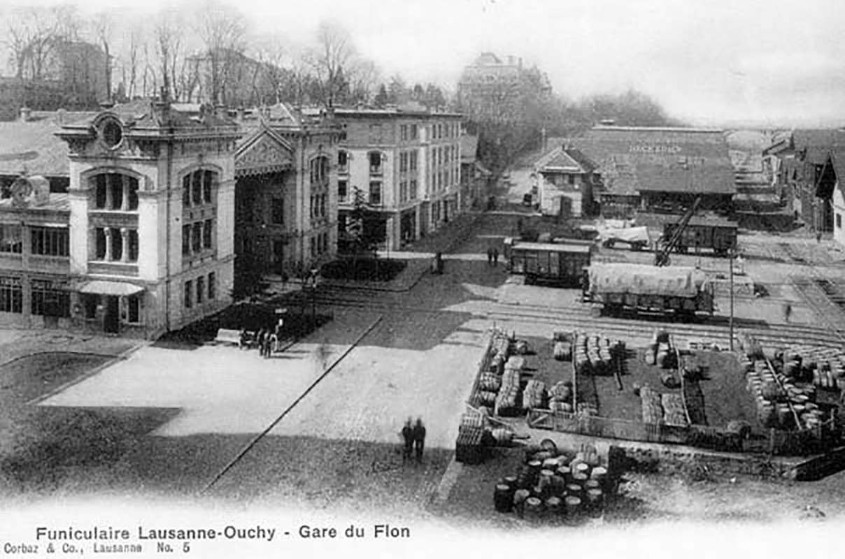 Gare de marchandise, trains et vagons sur la plateforme du Flon